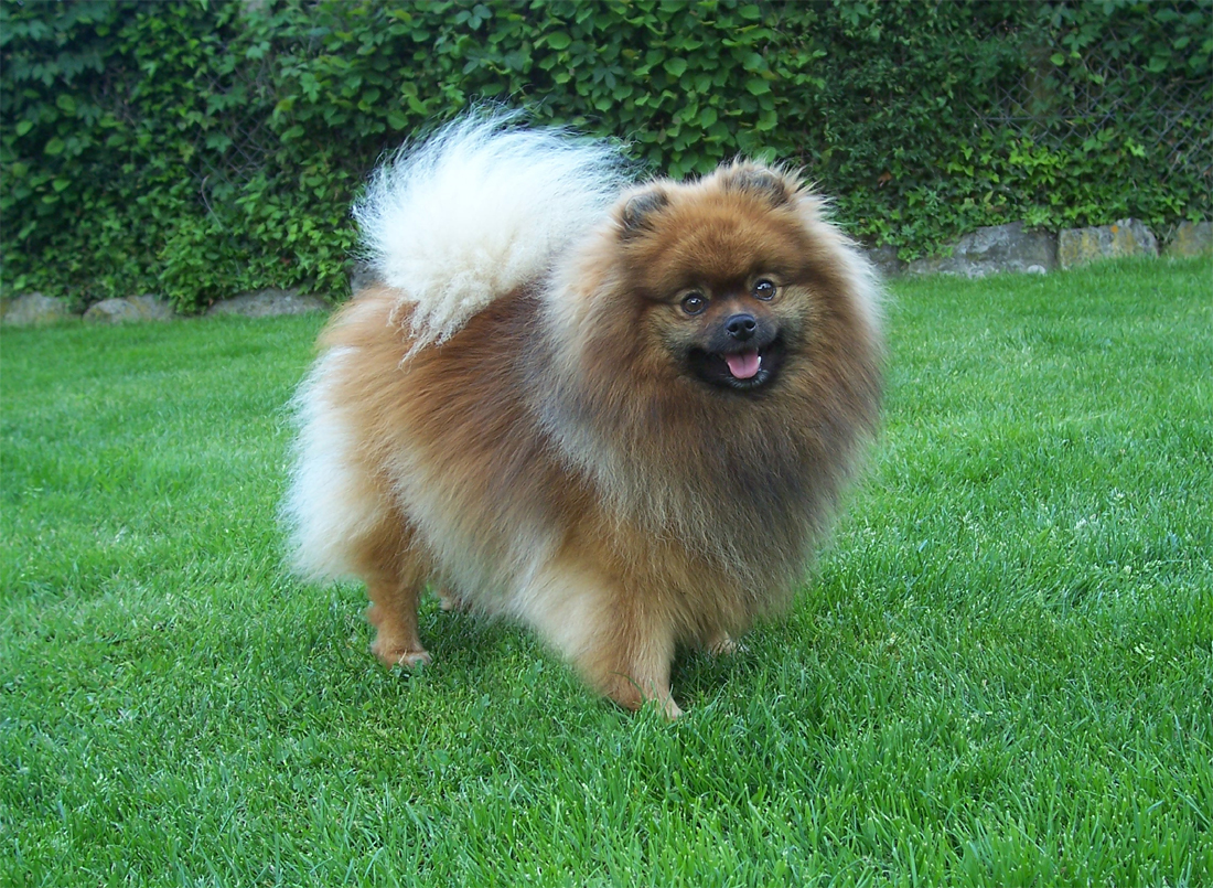 Aidi de l'Arche de Noé de Vieille Vigne - Petit Spitz Allemand Orange Zibelline 26 cm. Championne Internationale de Beauté 2009